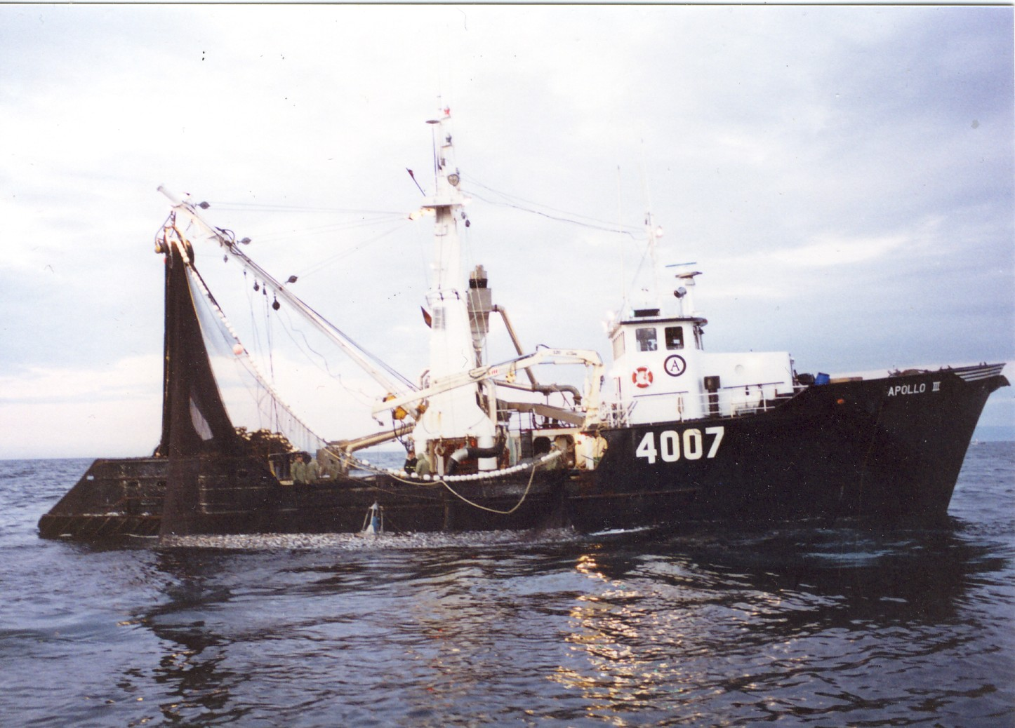 L'Apollo II, de Caraquet, au Canada, en mer.